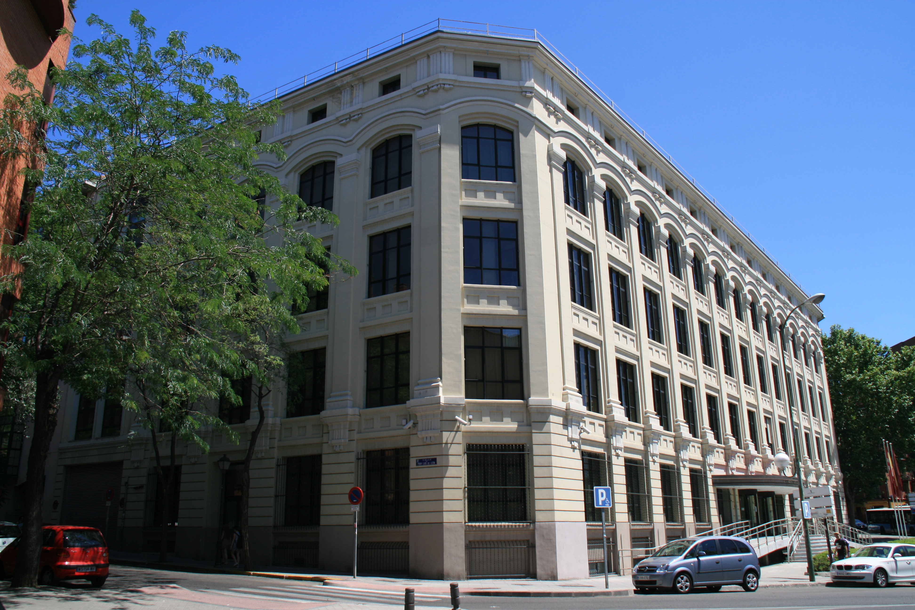 Fábrica Osram - Arganzuela